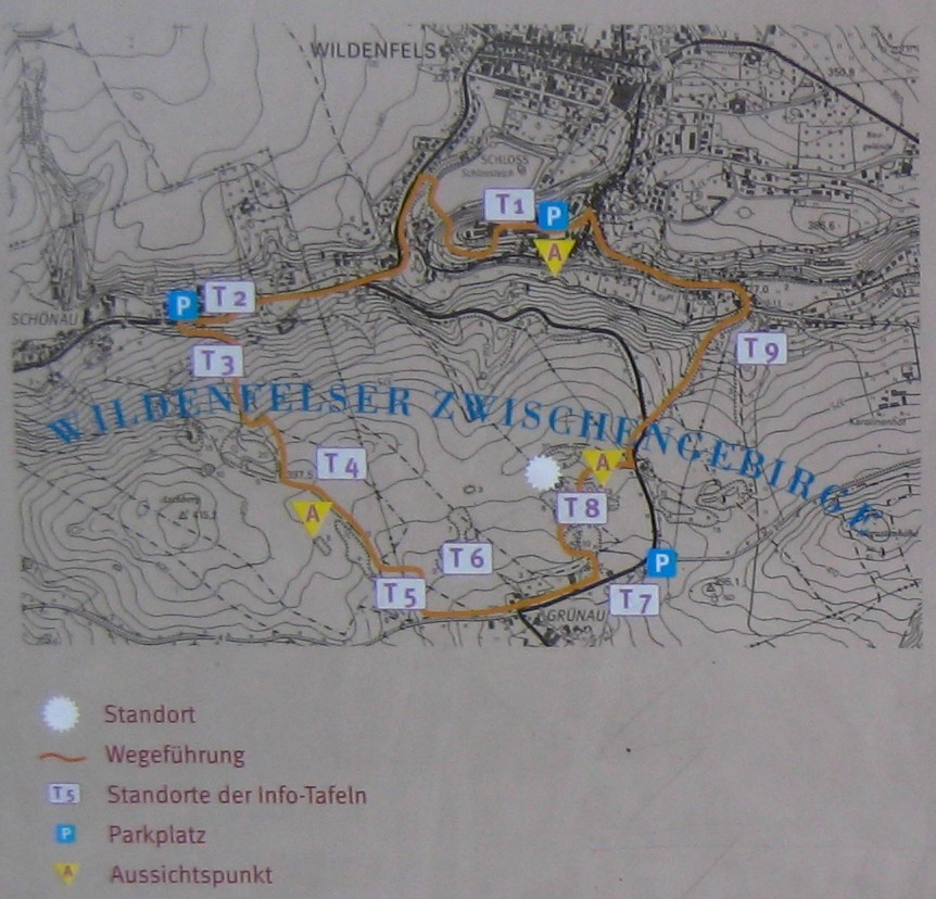 Lehrpfadübersicht Wildenfelser Zwischengebirge, von Tafelstation 8 abfotografiert (Panoramafreiheit)